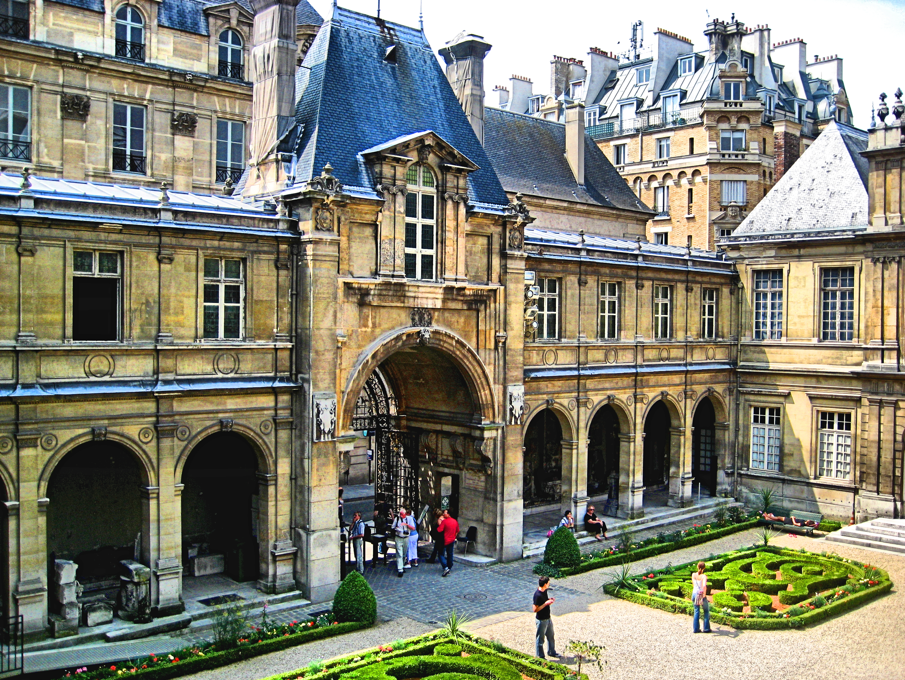 Carnevalet